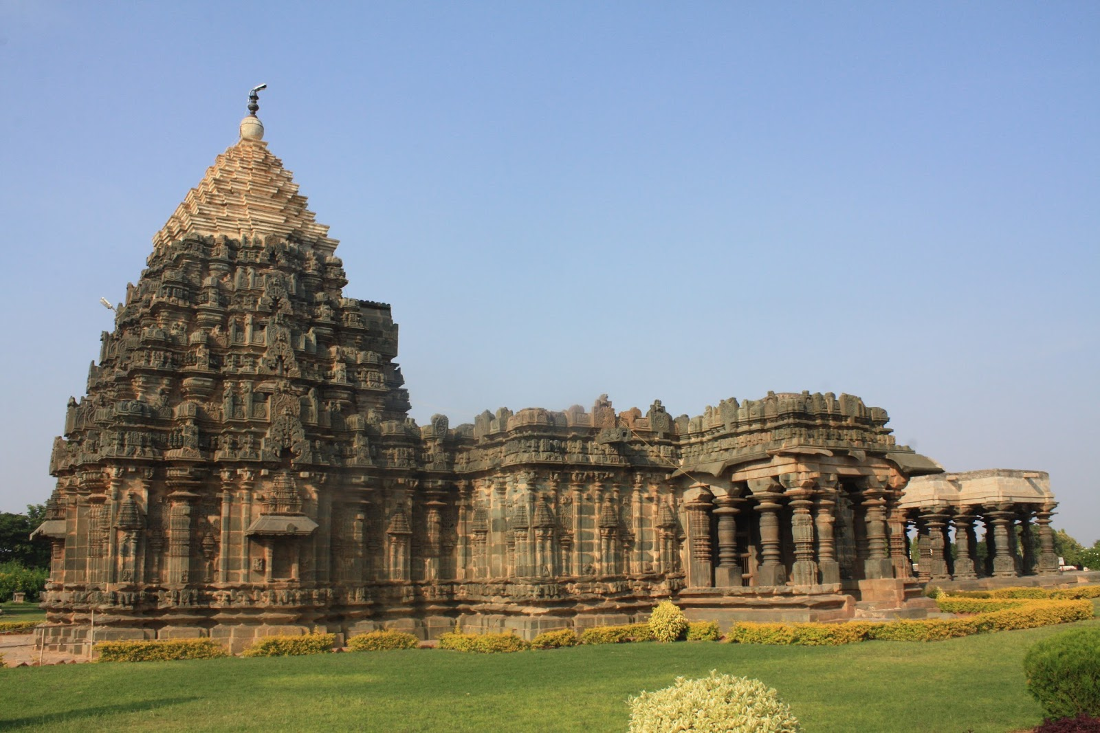 ಕನ್ನಡ: ಇಟಗಿ ಮಹಾದೇವ ದೇವಸ್ಥಾನ